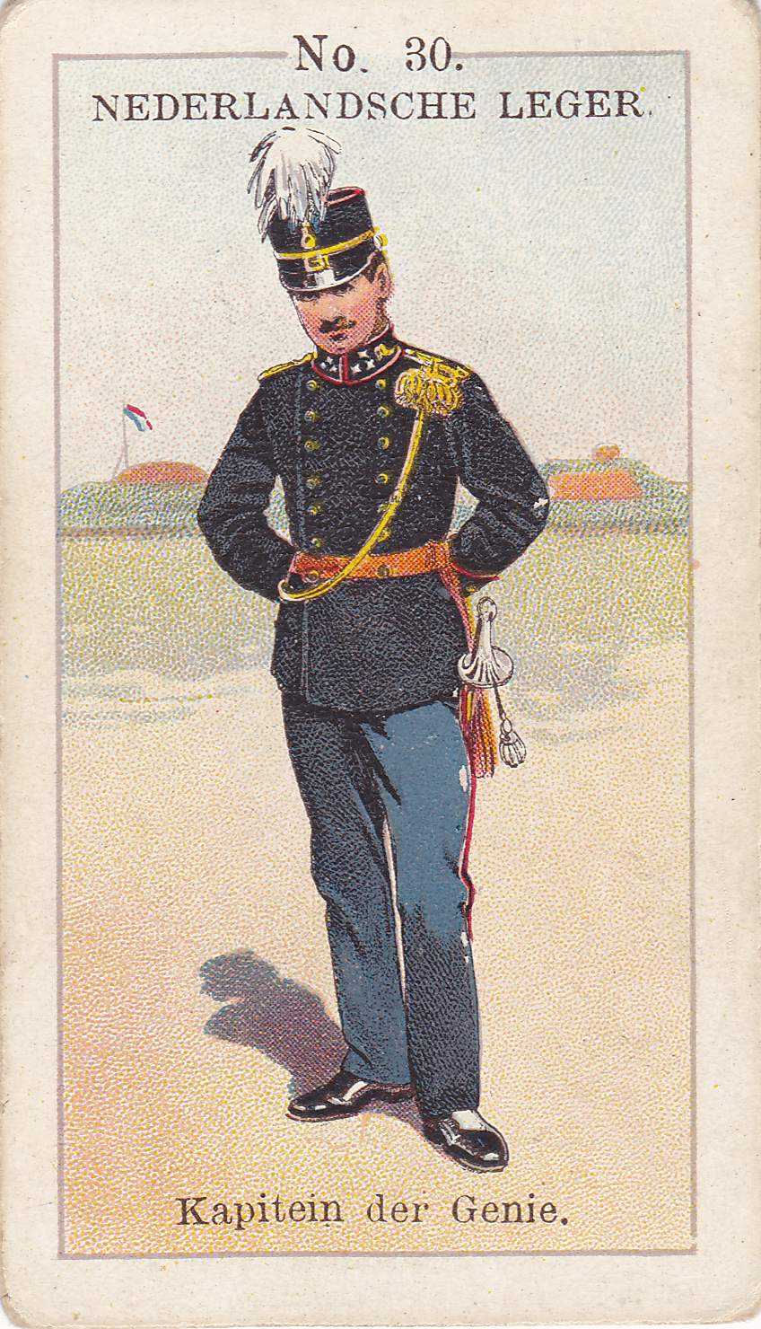 Uniform van het Nederlandsche leger rond 1900